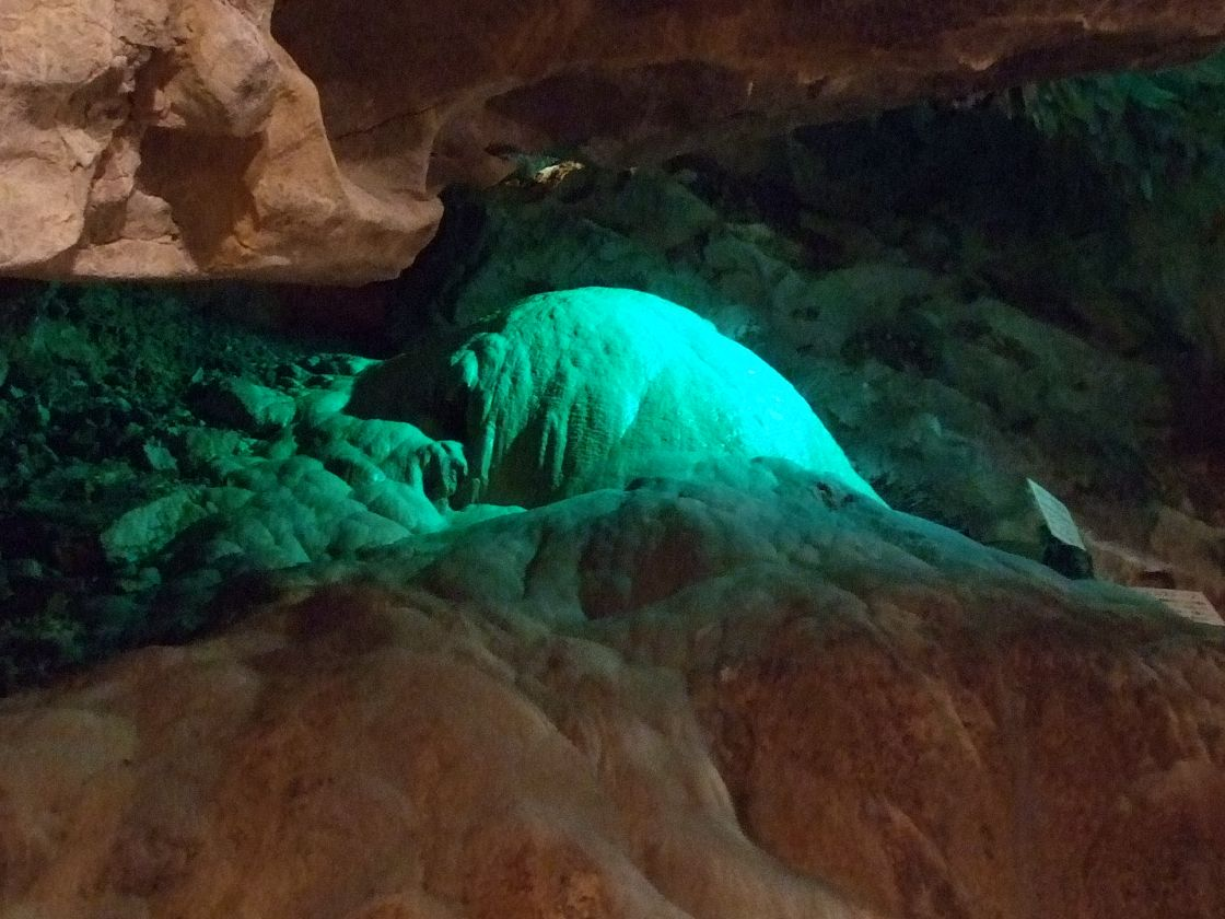 Kyusendo 球泉洞